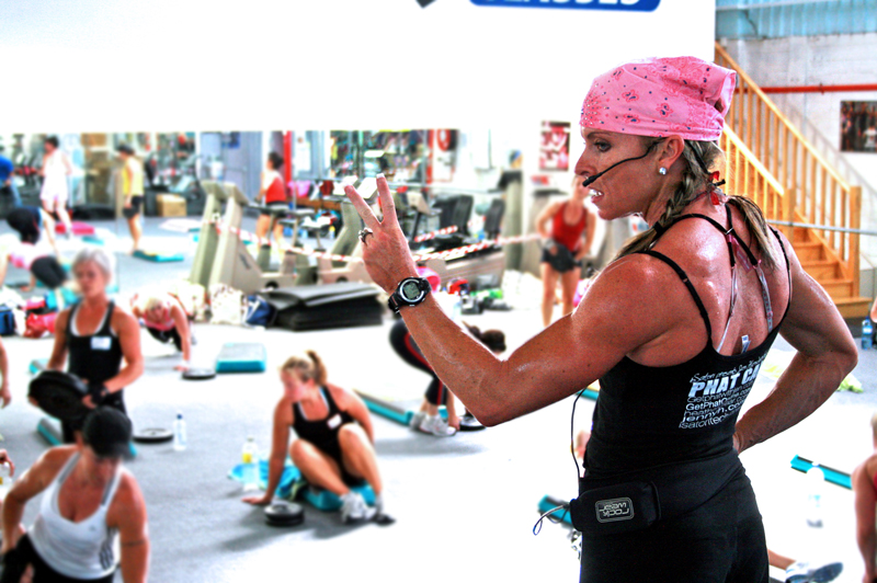 Jen Hendershott 2008 Australia